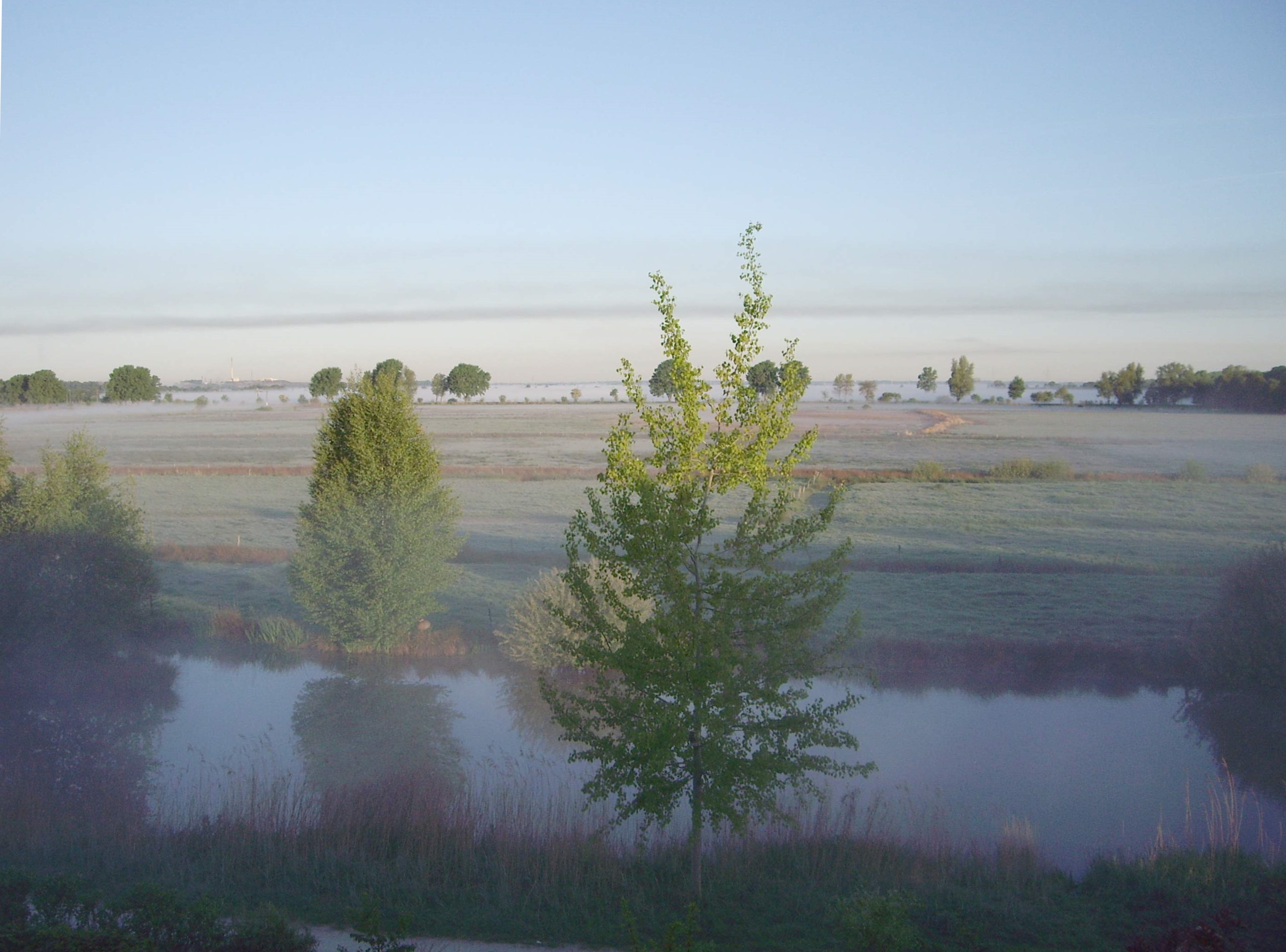 Morgennebel im Hollerland